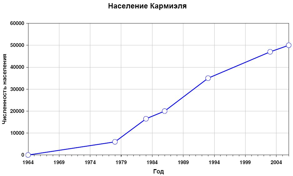 התפתחות האוכלוסייה בכרמיאל